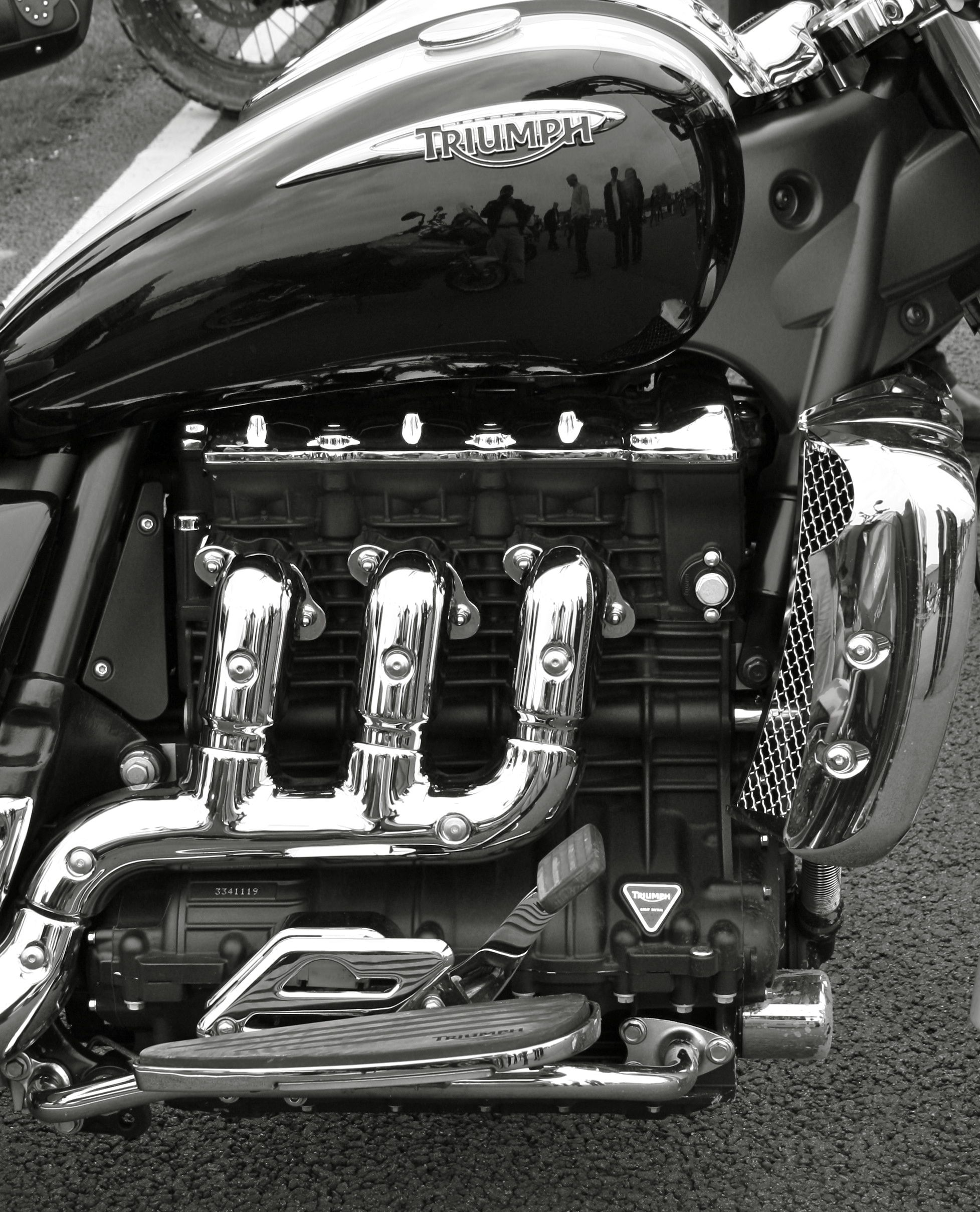 Triumph Rocket III engine